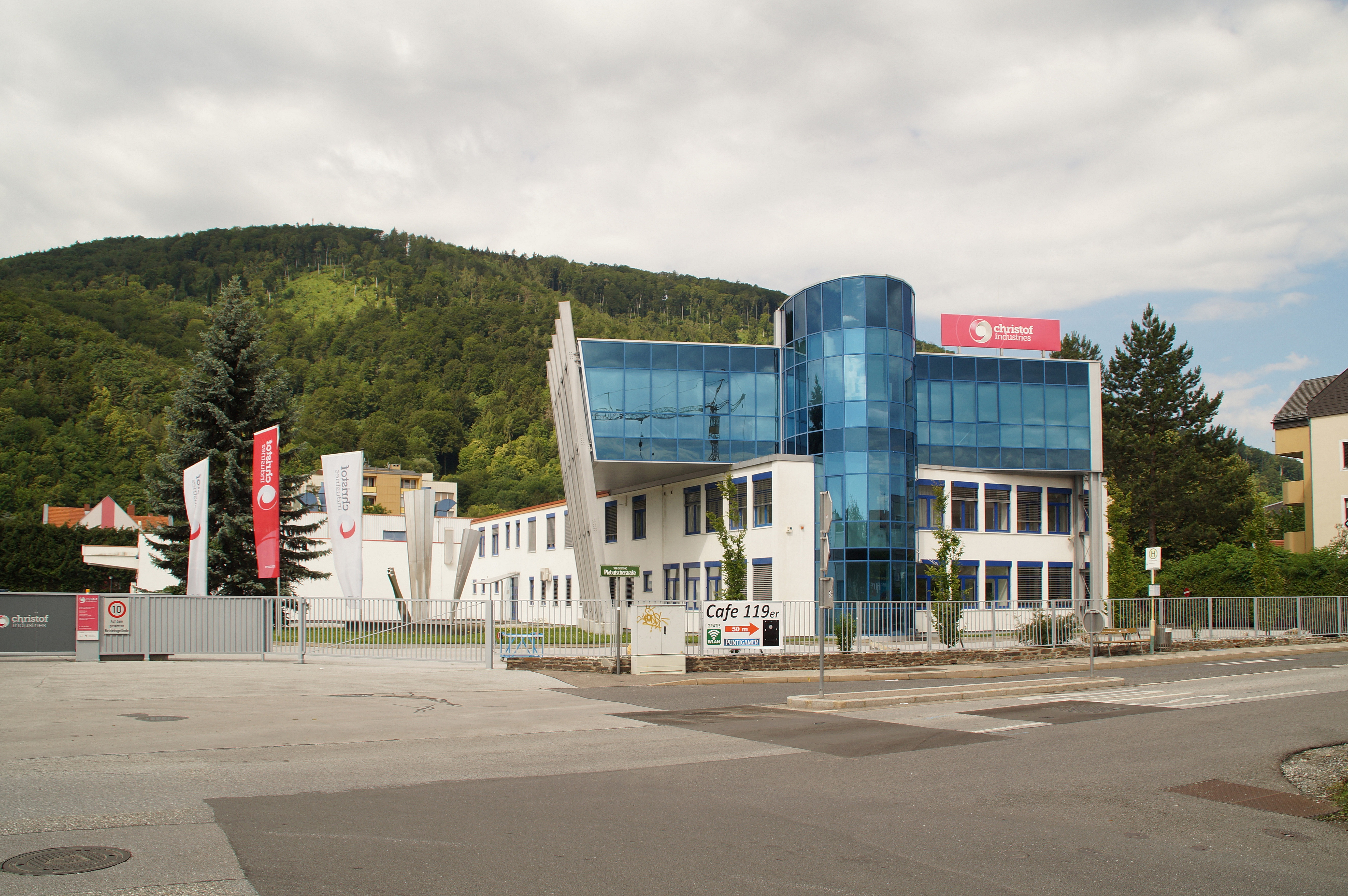 Firmensitz der Firma Christof Industries GmbH in der Plabutscherstraße in Graz.